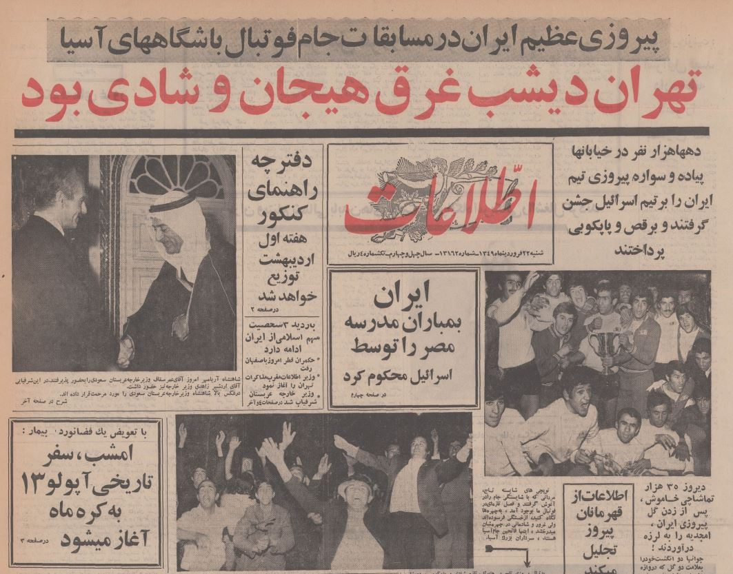 قهرمانی تاج در جام باشگاههای آسیا